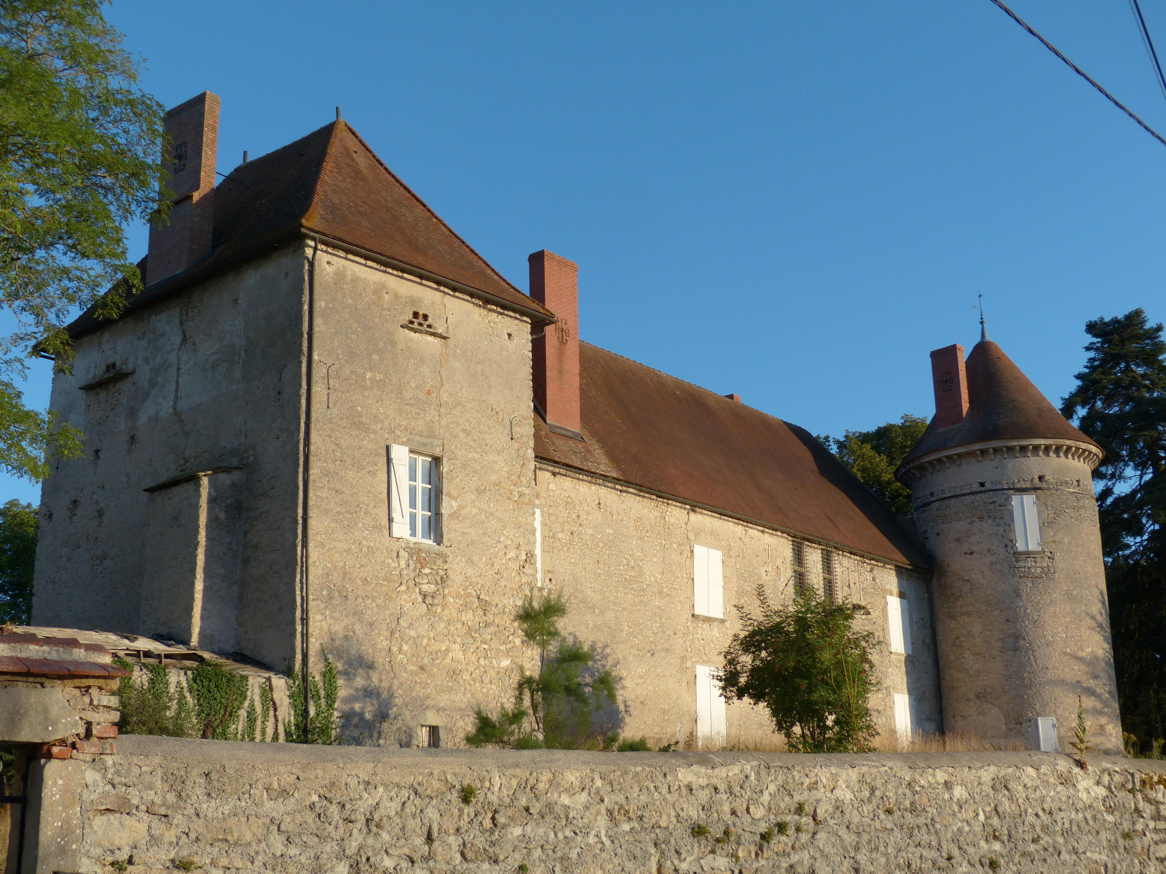 Château de La Chapelle-d'Andelot, à Vensat, Puy-de-Dôme (France).